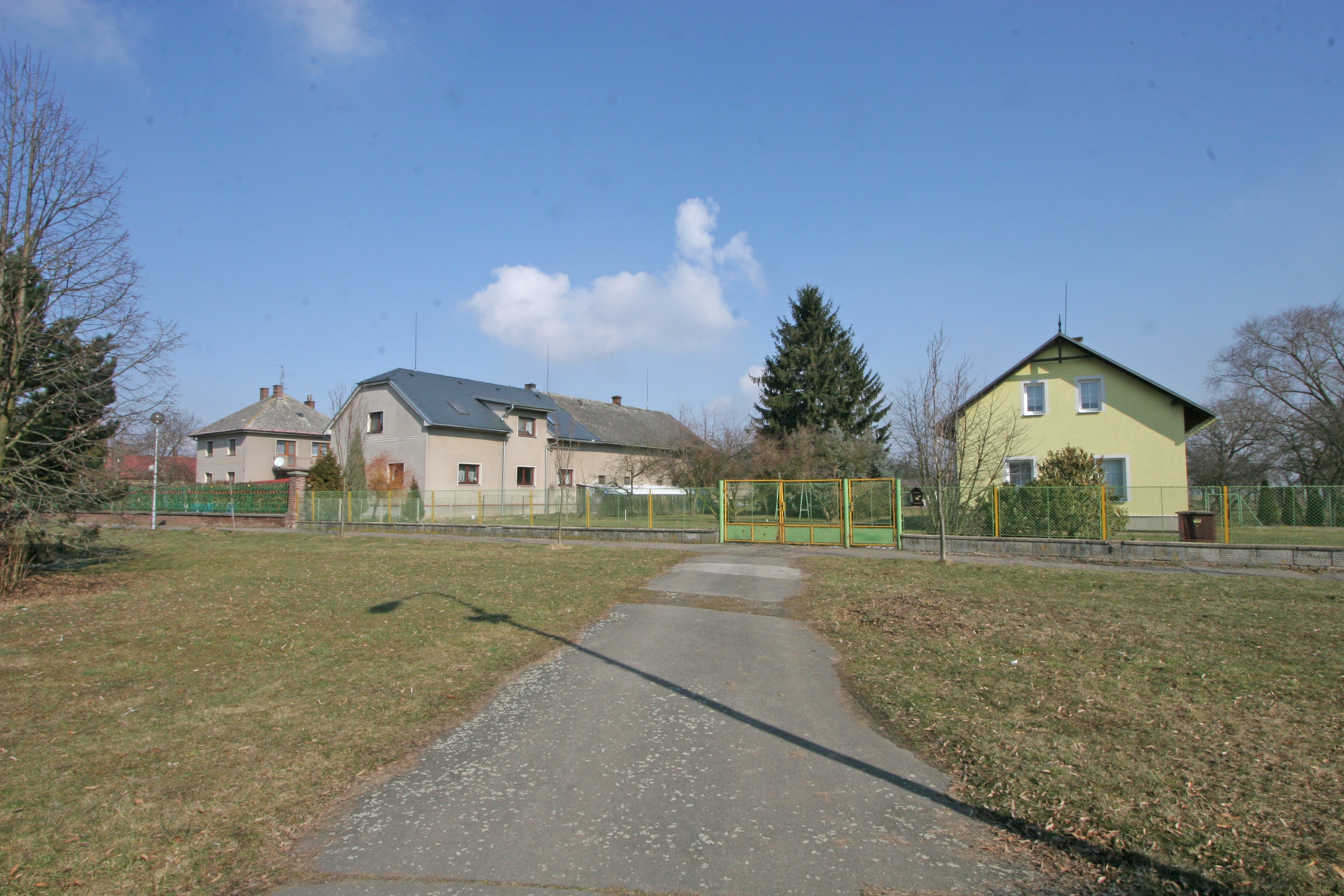 Urbanice čp. 4